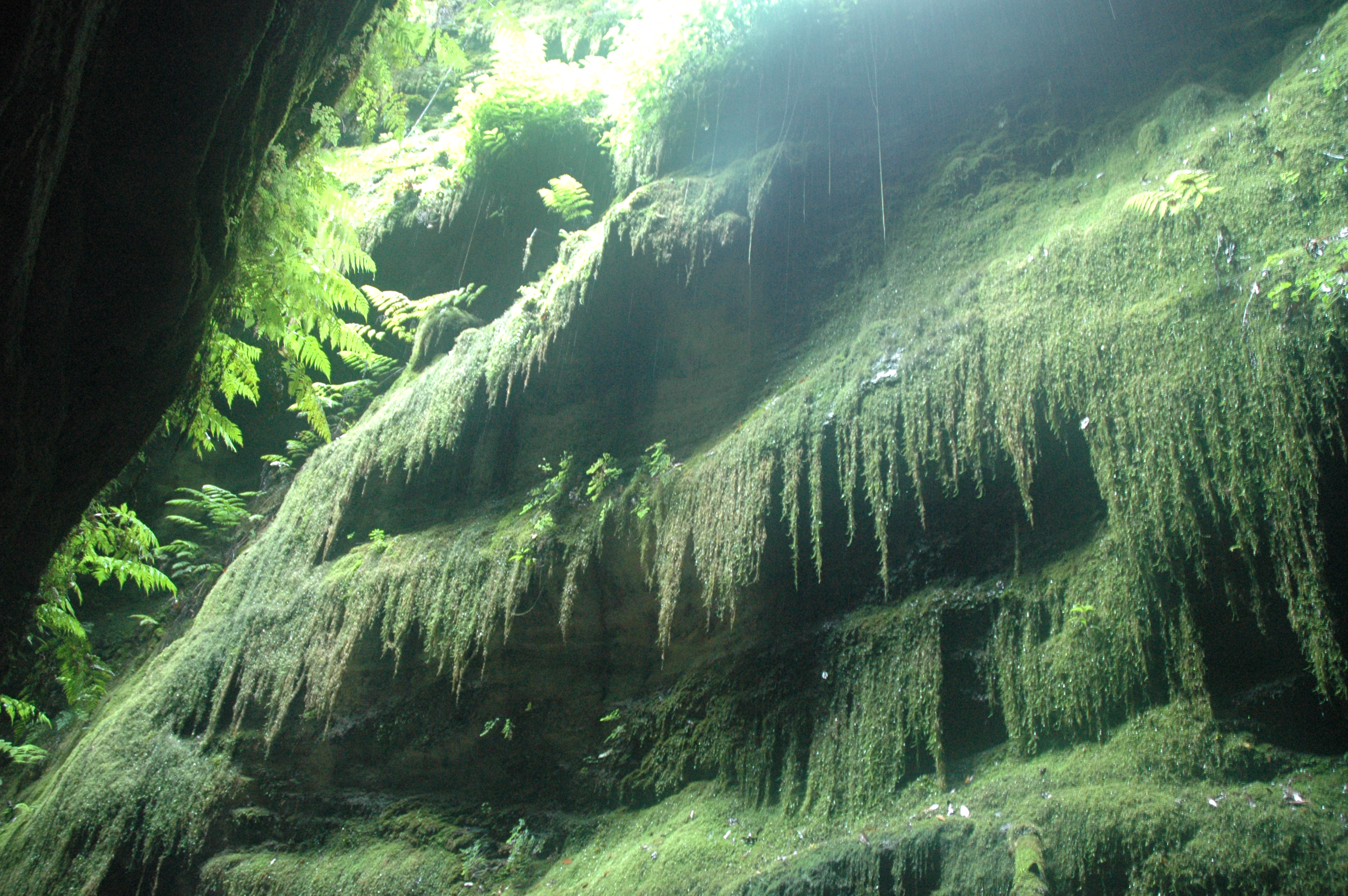 Cubo de la Galga (Puntallana), bosque de laurisilva. La Palma, Canary Islands. Octubre 2006